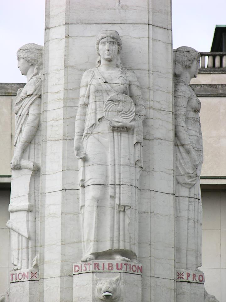 "L'Administration", une des quatre allégories figurant sur le mémorial